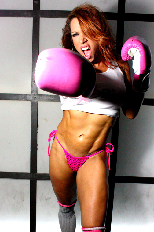 Model April Hunter